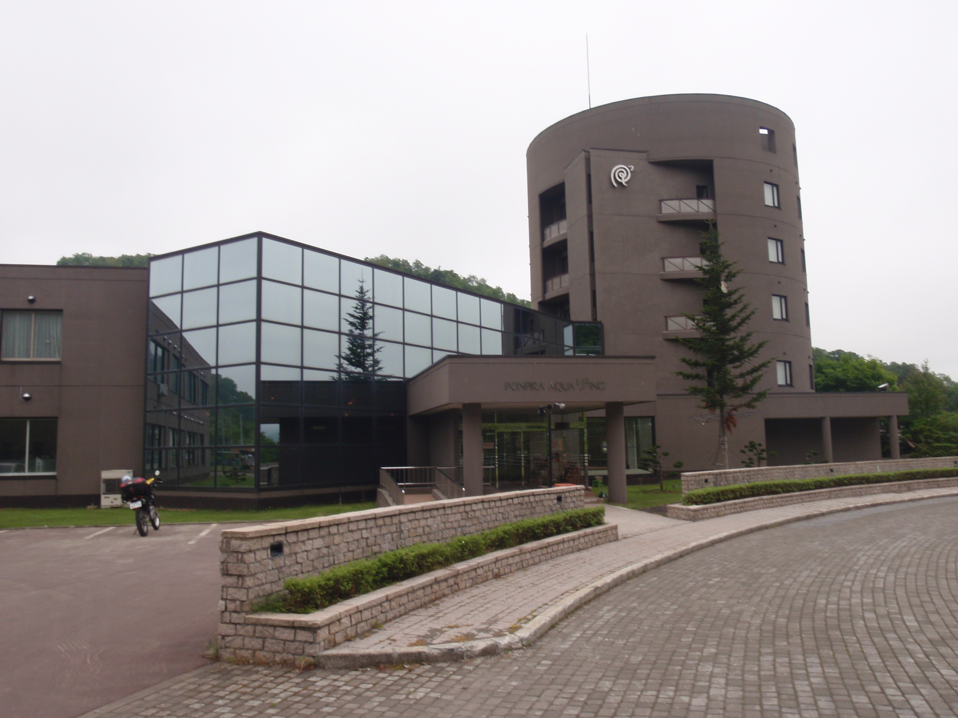 ぽんびら温泉、ポンピラアクアリズイング